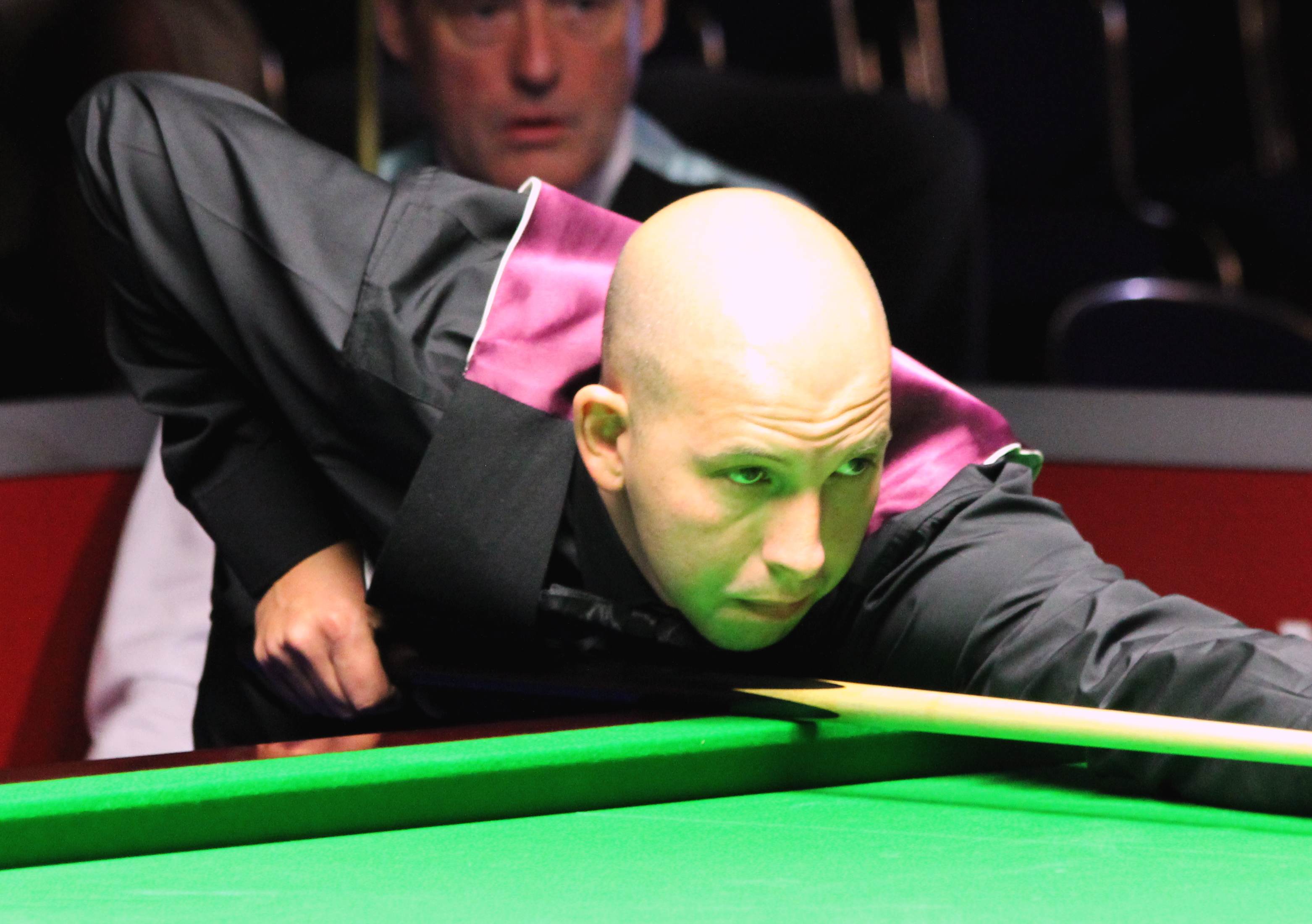 Jamie Curtis-Barrett beim Paul Hunter Classic 2016